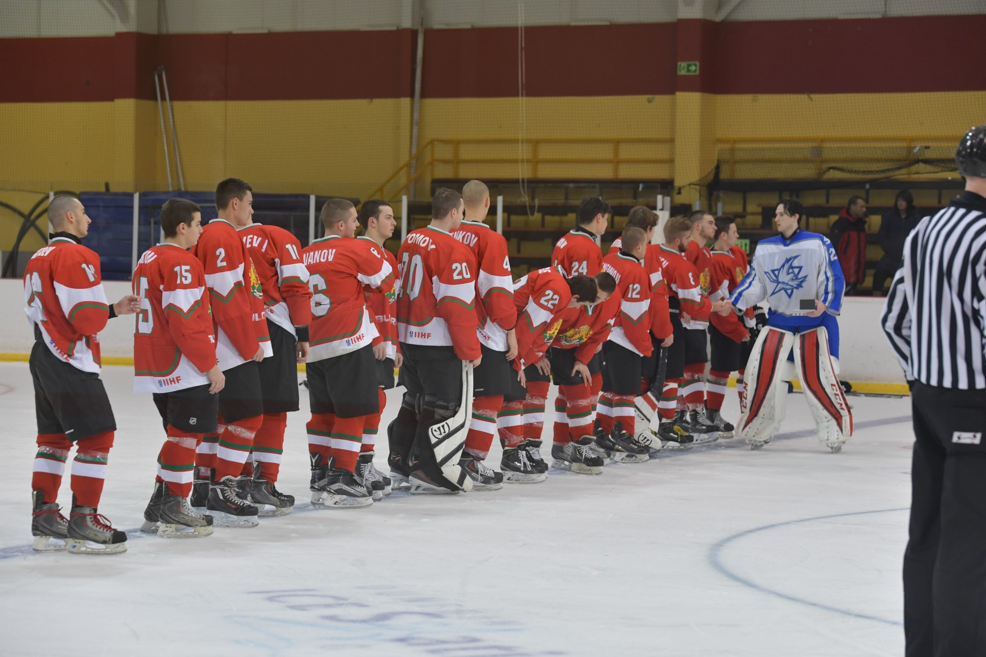 IIHF U20 Div 3 2017 Israel v Bulgaria